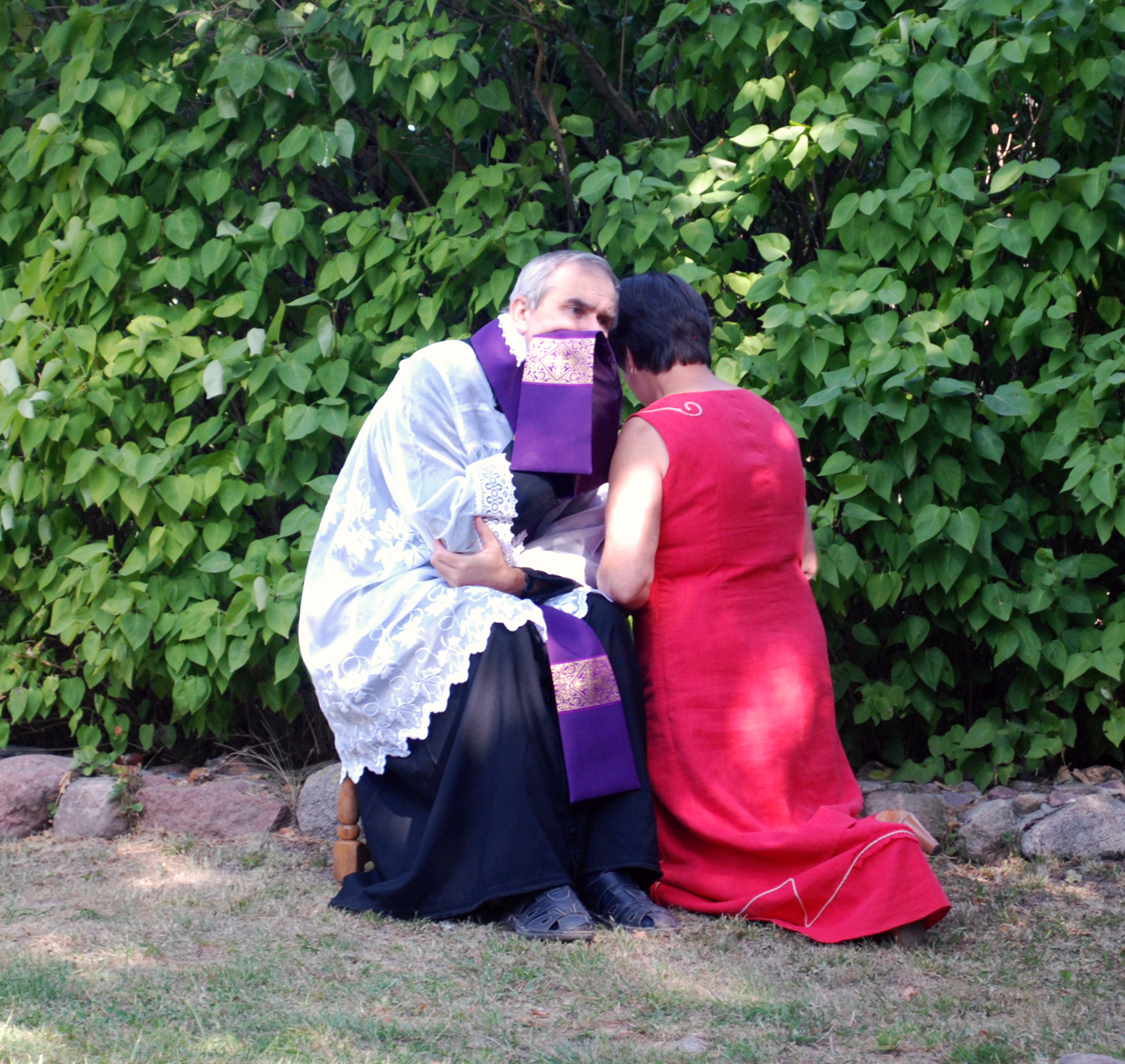 Pielgrzymka do kapliczki Matki Boskiej Częstochowskiej w Nowej Wsi Reszelskiej - spowiedź polowa